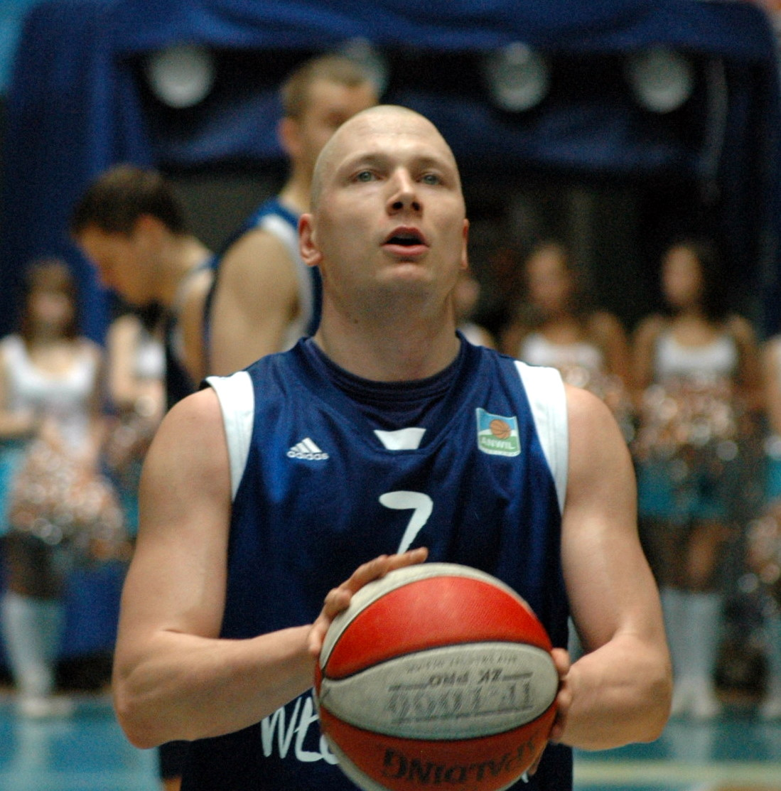 Krzysztof Szubarga podczas meczu Anwilu Włocławek z Kotwicą Kołobrzeg w Kołobrzegu.